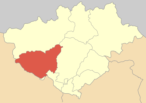 Дем Просечен на картата на Ном Драма, Гърция Locator map of Prosotsani municipality (Δήμος Προσοτσάνης) in Drama prefecture (Νομός Δράμας) in Greece.